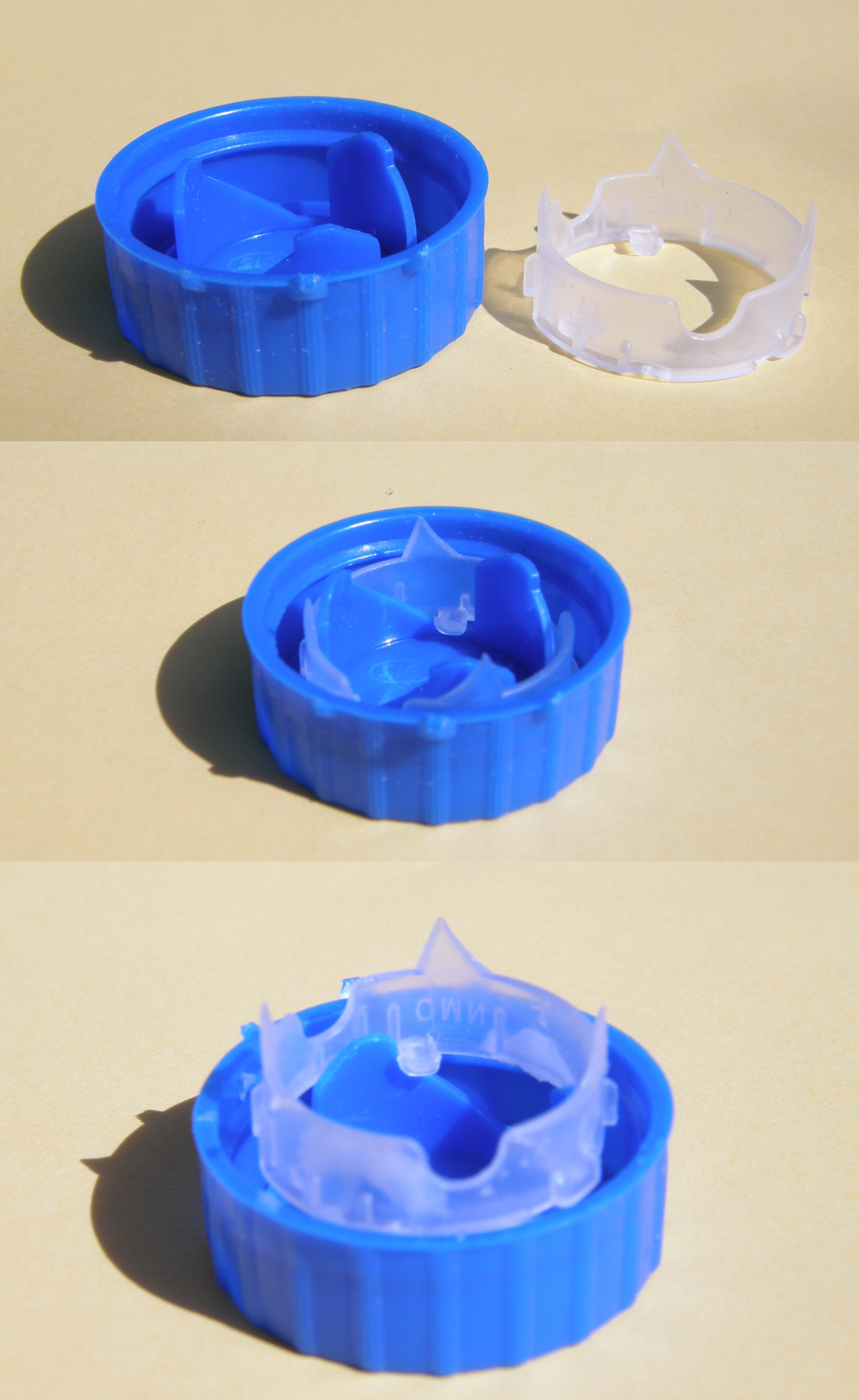 Siegel-Schneidring Detailaufnahme. Oben: Einzelteile, Schraubkappe und Schneidring mit 3 Spitzen Mitte: geschlossener Zustand Unten/Funktion: durch Drehen des Schraubverschlusses wird das Foliensiegel nach unten durchstochen und aufgeschlitzt (Schraubverschluß auf dem Kopf liegend, um den Hub-Schneidevorgang zu demonstrieren.) Durch die Schräge in der Kappe wird der Schneidring bewegt.